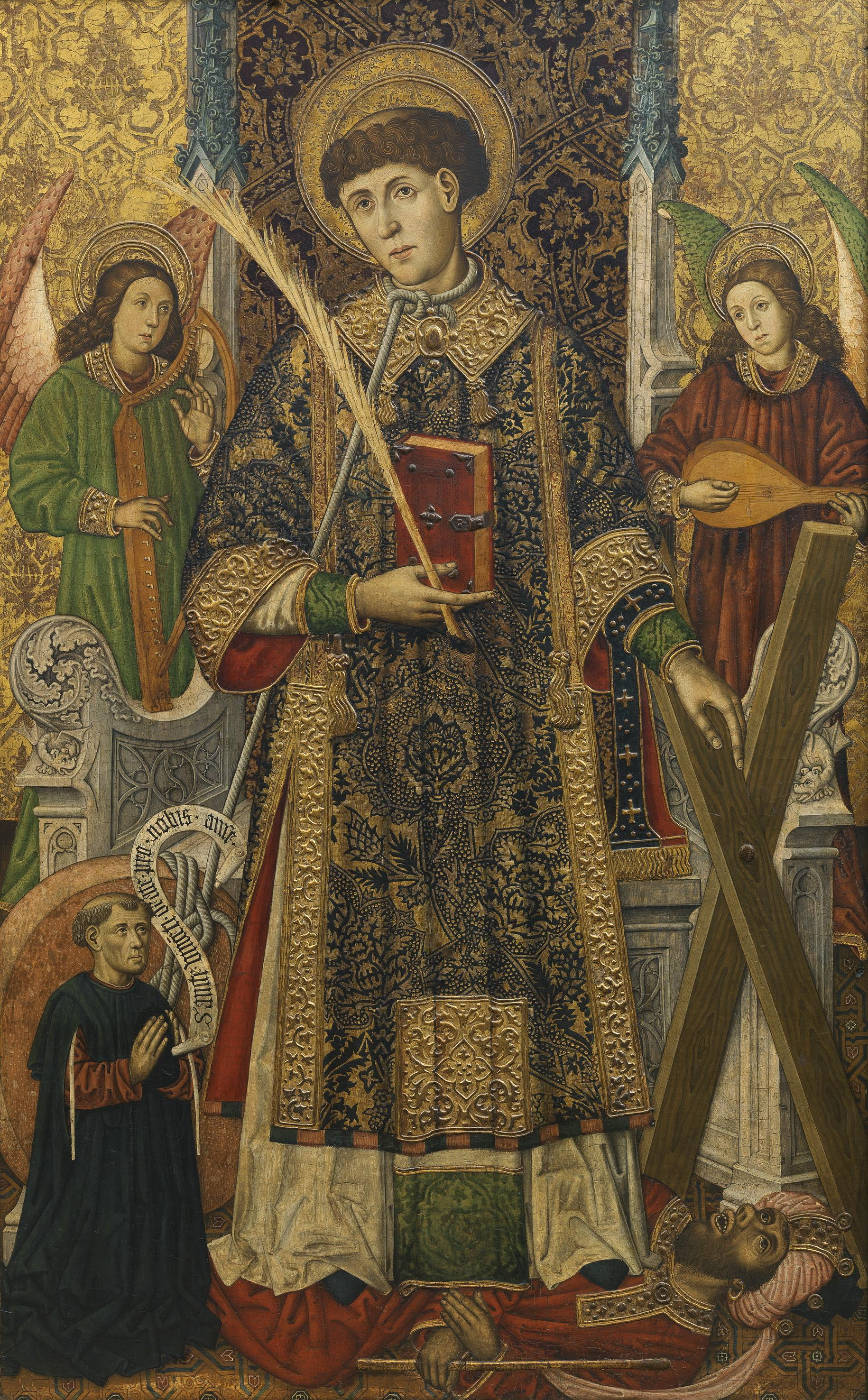 La obra representa al diácono y mártir San Vicente de Huesca, que murió en tiempos del Imperio Romano por profesar el cristianismo.